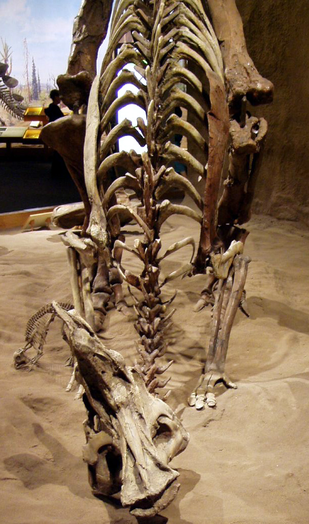 Lambeosaurus skeleton, Royal Tyrrell Museum.